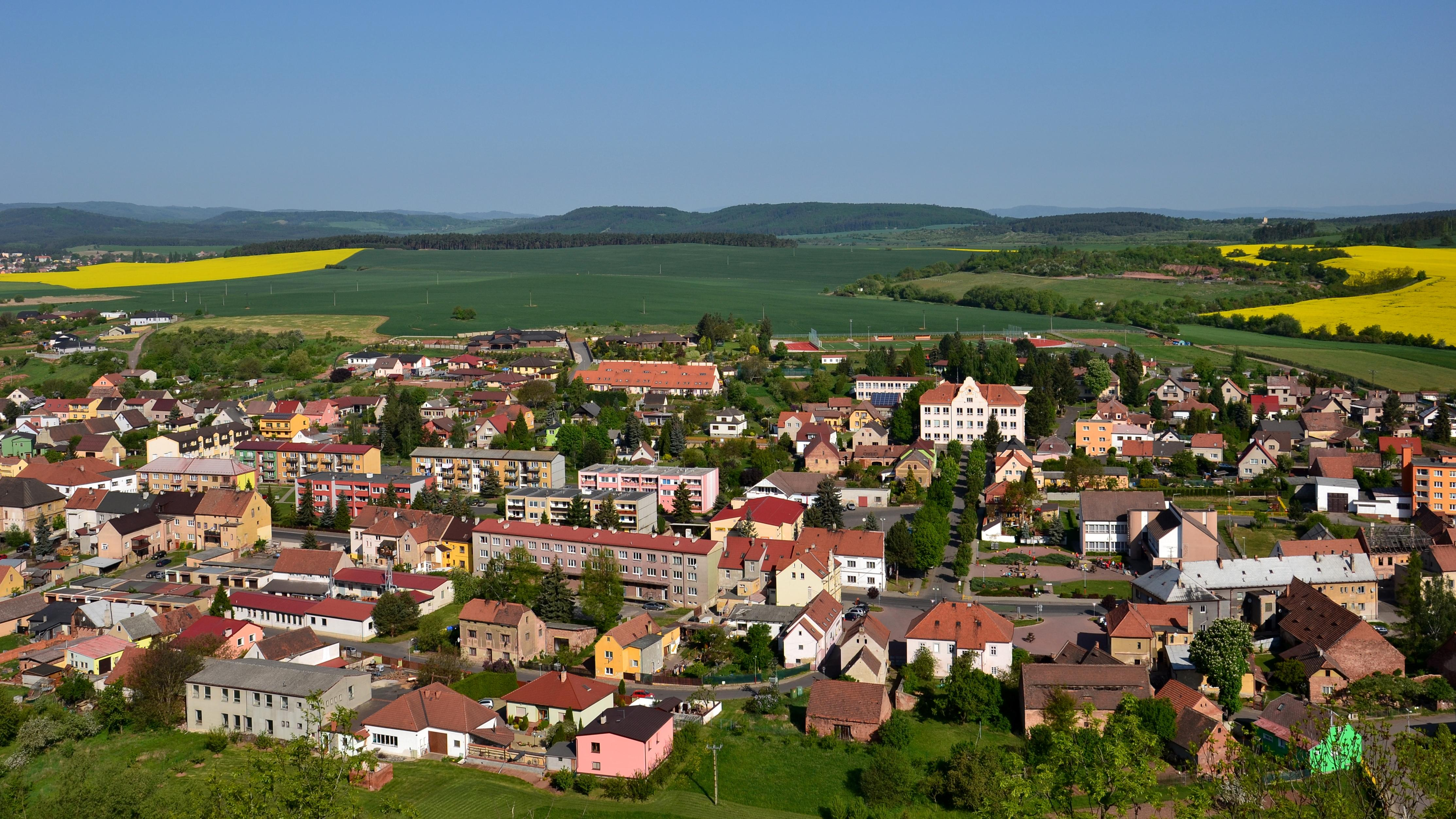 Kryry – centrum města